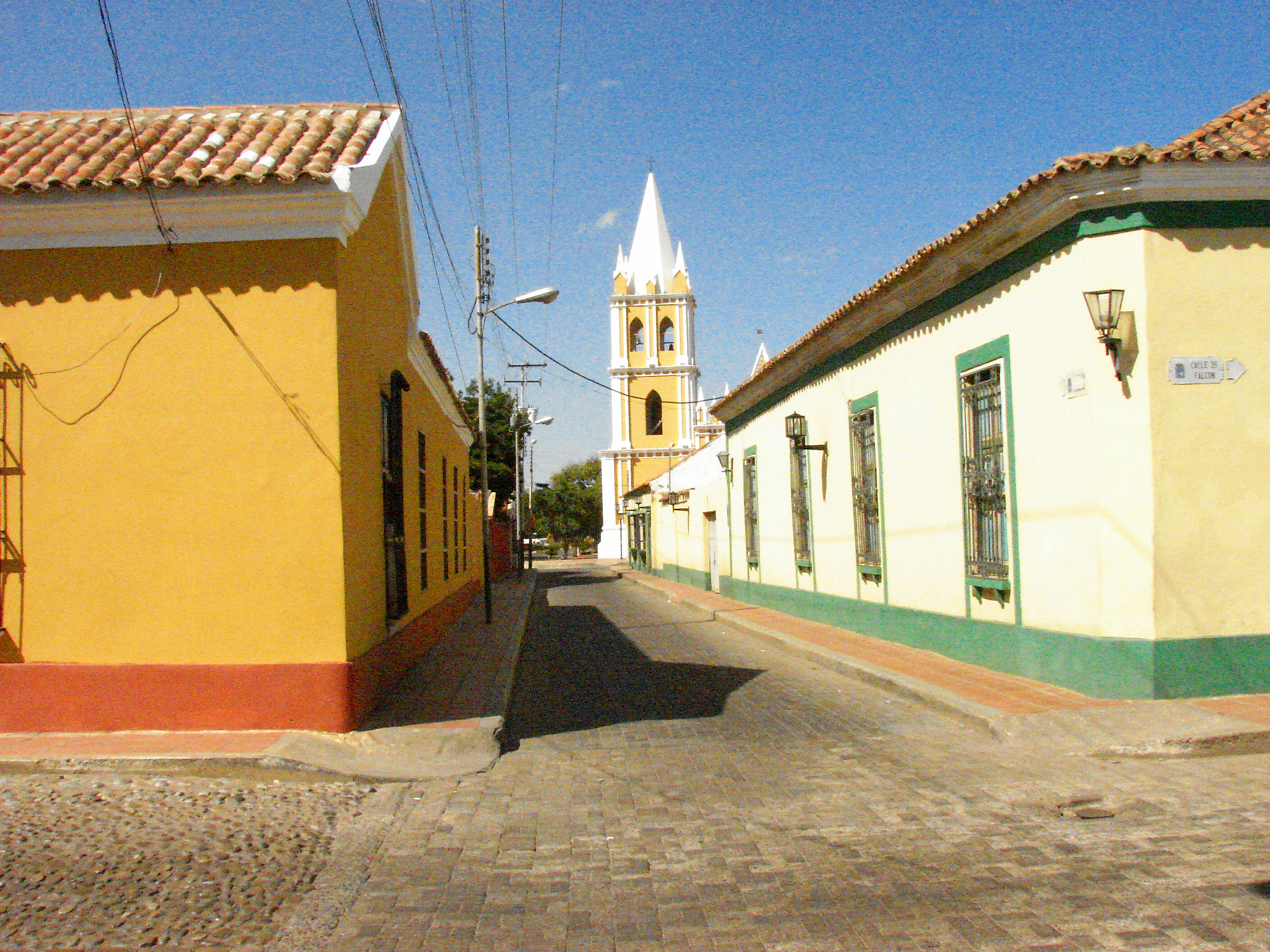 Santa Ana de Coro, Estado Falcón